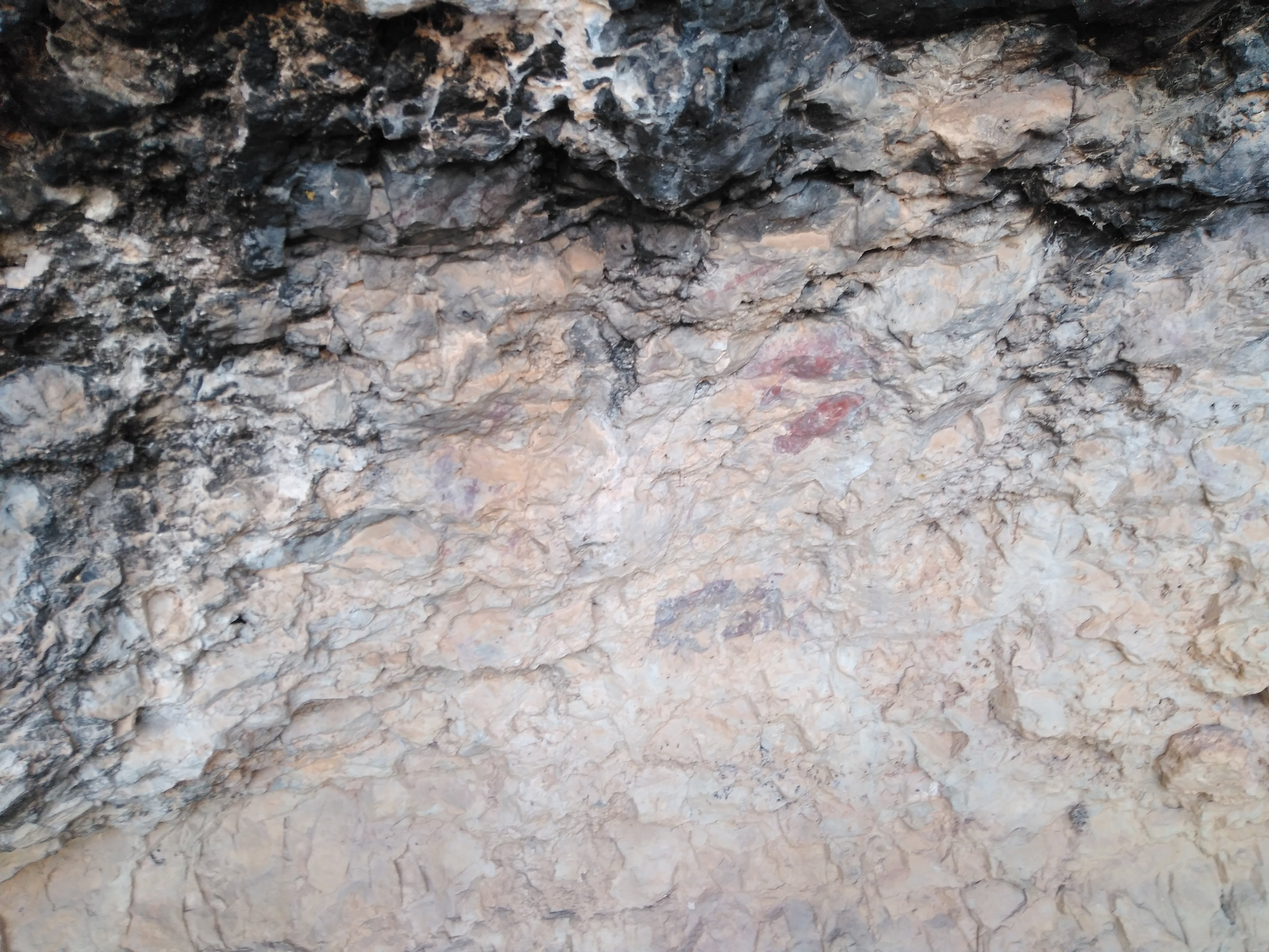 Pintures rupestres localitzades a Palanques.